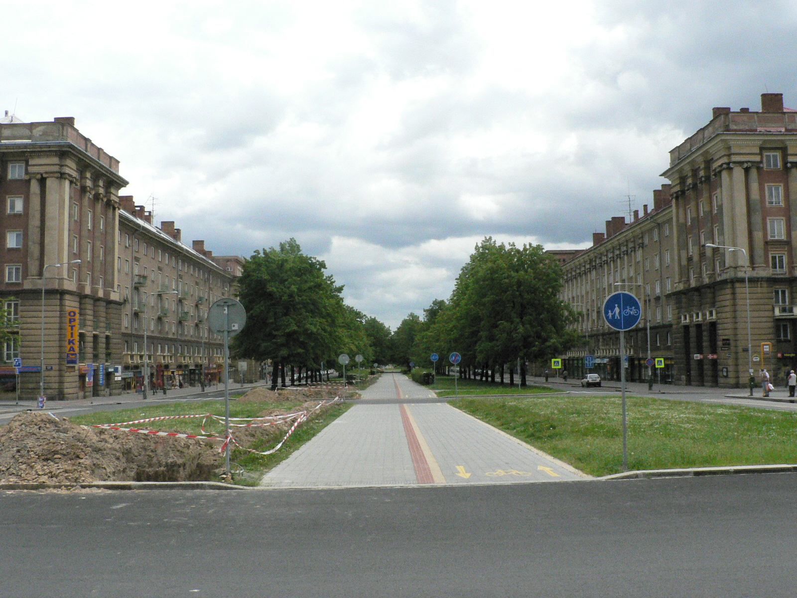 Pohled na Hlavní třídu v Porubě z Alšova nám.